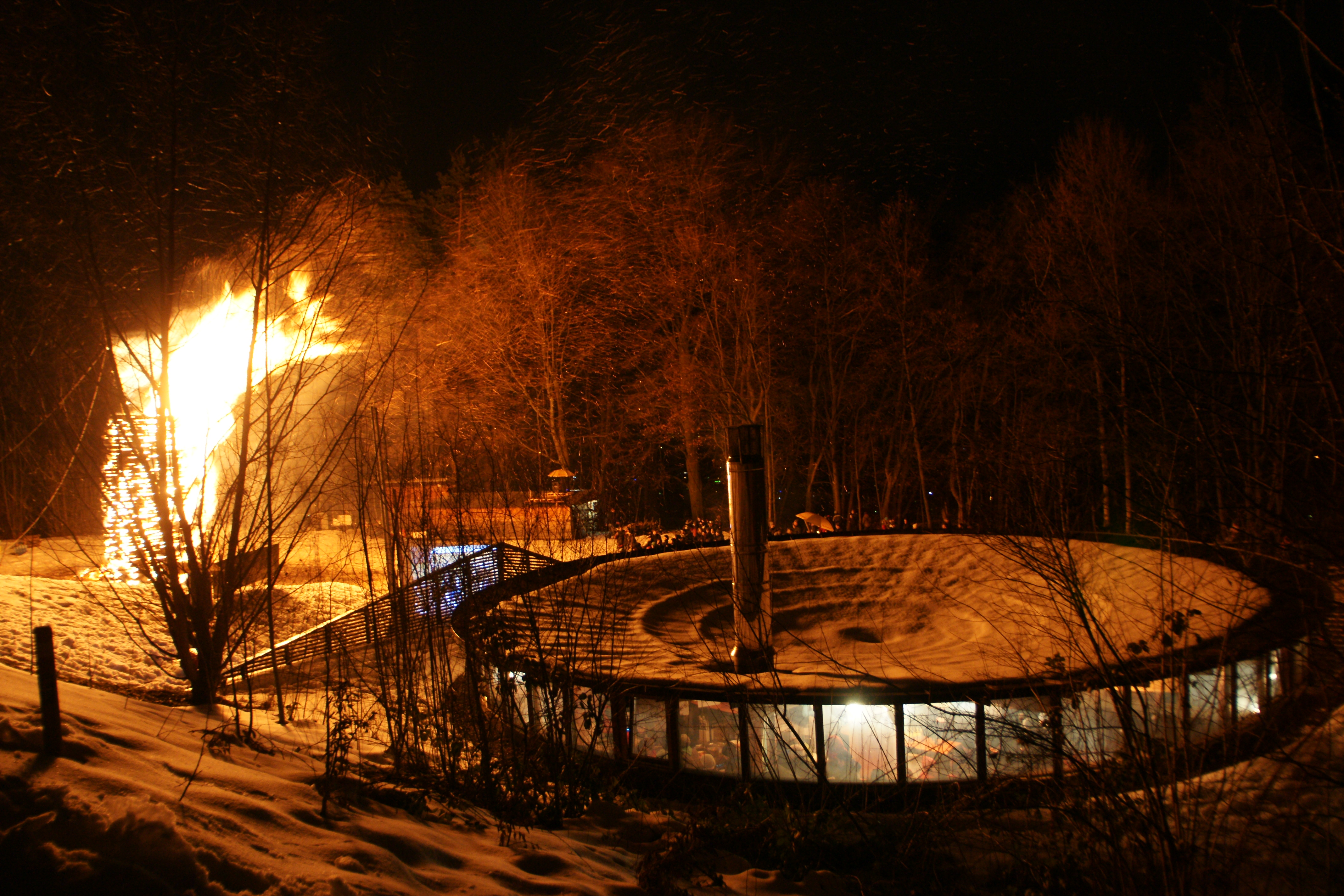 das 10. traditionelle Funkenfeuer der Pfadfindergruppe Dornbirn auf am Zanzenberg in Dornbirn, Vorarlberg.